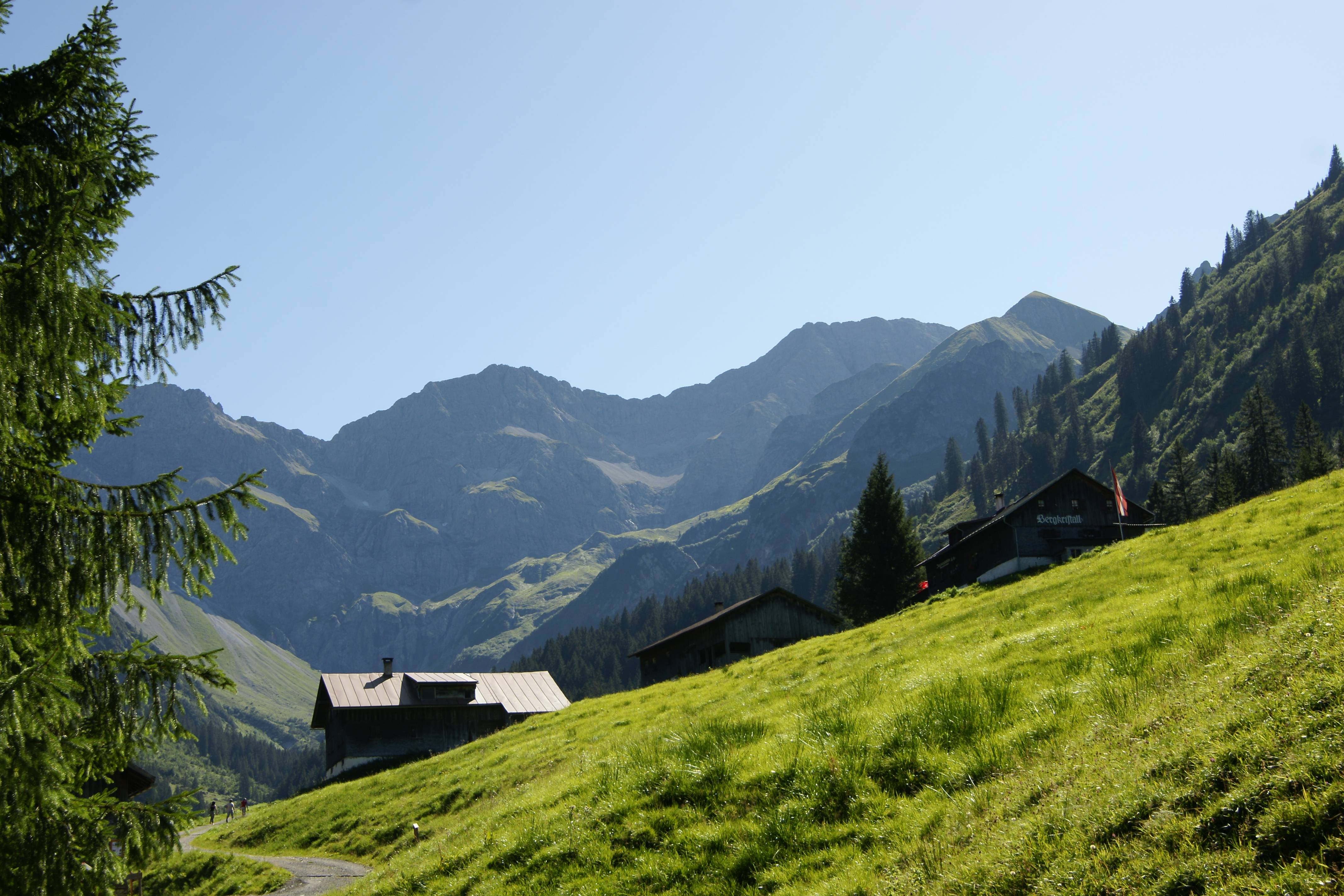 Der Zitterklapfen (2.403 m) ist ein markanter, 2 km langer Gipfelgrat in der Nordhälfte des Lechquellengebirges. Blick vom Bodenvorsäß.